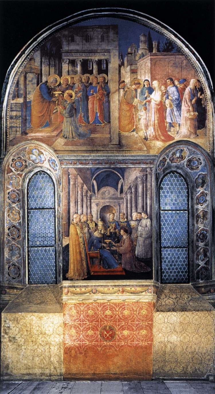 ANGELICO, Fra West wall of the chapel Fresco Cappella Niccolina, Palazzi Pontifici, Vatican